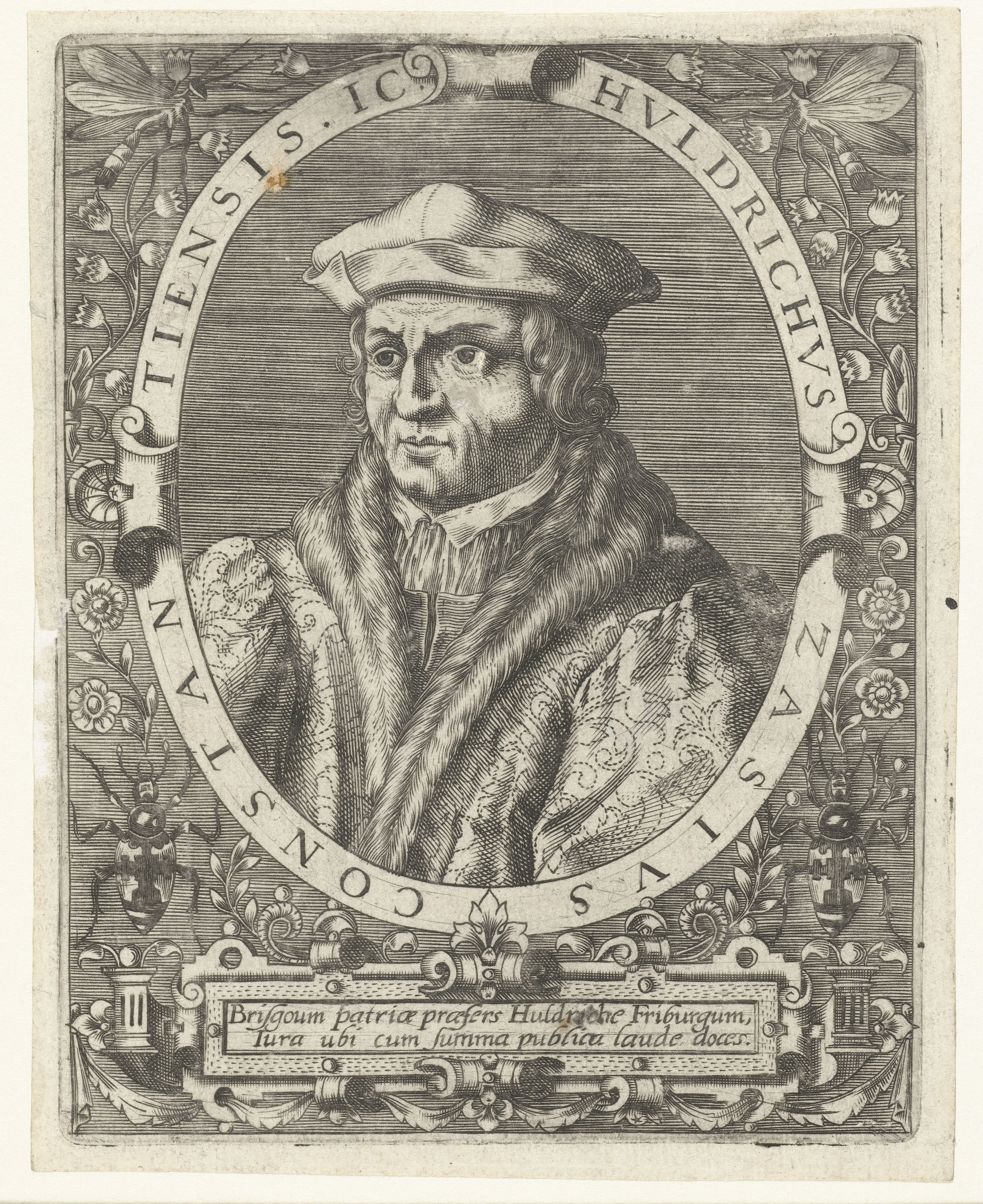 IdentificatieTitel(s): Portret van Ulrich ZasiusHuldrichus Zasius Constantiensis (titel op object)Objecttype: prent boekillustratie Objectnummer: RP-P-OB-31.459Catalogusreferentie: Singer 99063Opschriften / Merken: verzamelaarsmerk, verso, gestempeld: Lugt 2228verzamelaarsmerk, verso, gestempeld: Lugt 964Omschrijving: Portret van de jurist Ulrich Zasius, in ovaal met randschrift. Onder het portret een lofdicht.VervaardigingVervaardiger: prentmaker: Theodor de Bryprentmaker: Johann Theodor de Brynaar ontwerp van: Jean Jacques Boissard (mogelijk)Plaats vervaardiging: Frankfurt am MainDatering: ca. 1597 - ca. 1599Fysieke kenmerken: gravureMateriaal: papier Techniek: graveren (drukprocedé)Afmetingen: plaatrand: h 140 mm × b 100 mmToelichtingGemaakt voor: J.J. Boissard, Icones virorum illustrium doctrina &c eruditione praestanti um contines. Frankfurt am Main: de Bry, 1597-1599.OnderwerpWie: Ulrich ZasiusVerwerving en rechtenVerwerving: ruilCopyright: Publiek domein